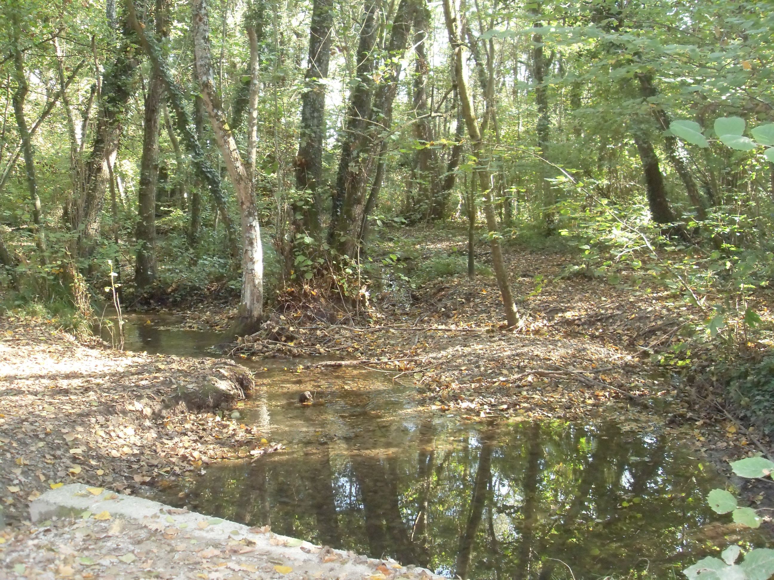 Le ruisseau du Turitin à proximité de l'étang de Saint-Bonnet à Villefontaine (Isère)